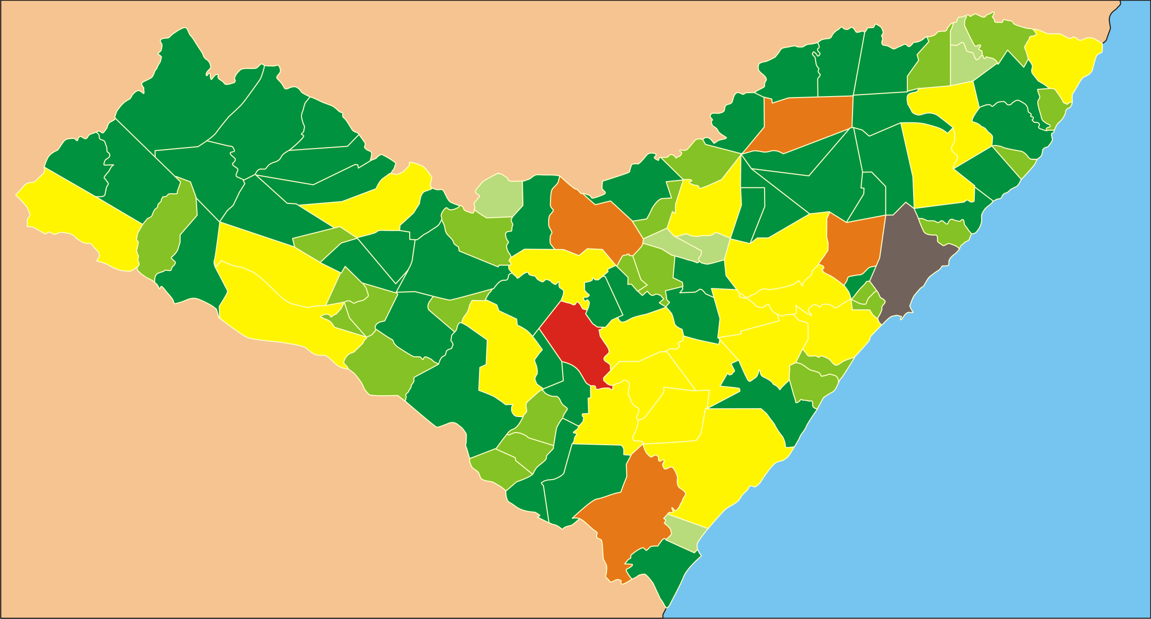 Mapa identificando a população por cidade do estado de Alagoas.